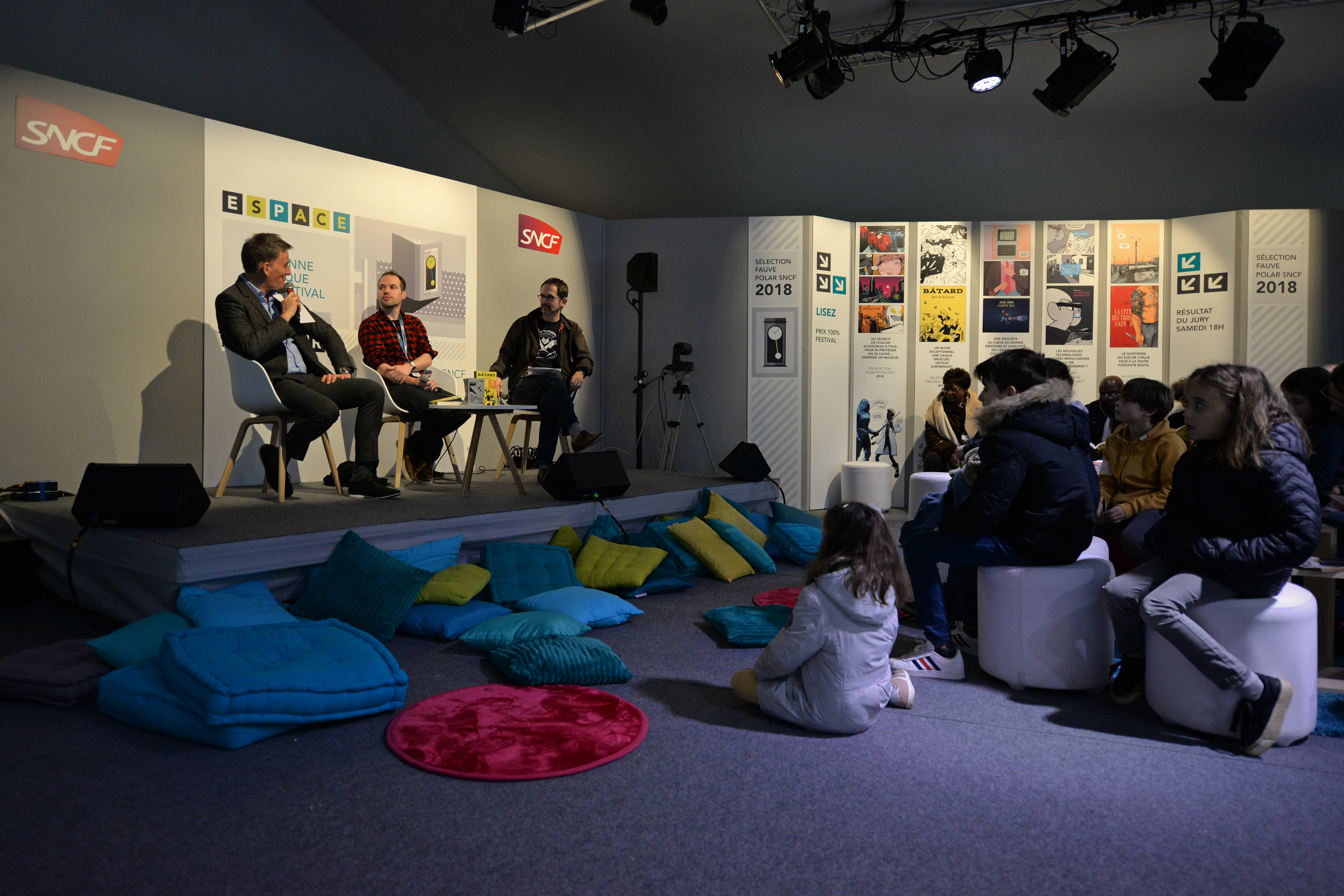 Rencontre avec Max de Radiguès, Espace Polar SNCF, Festival d'Angoulême 2018.